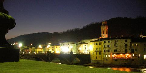 Emiliàn e rumagnòl: Santa Sofia.